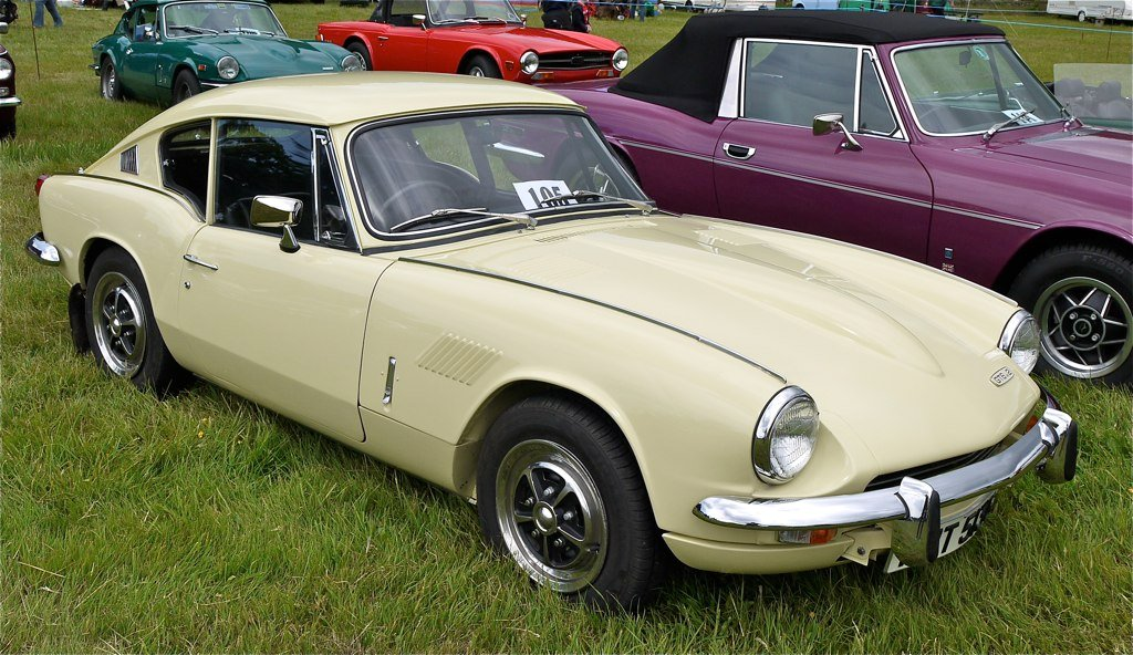 Panasonic G1 14-45 Lens